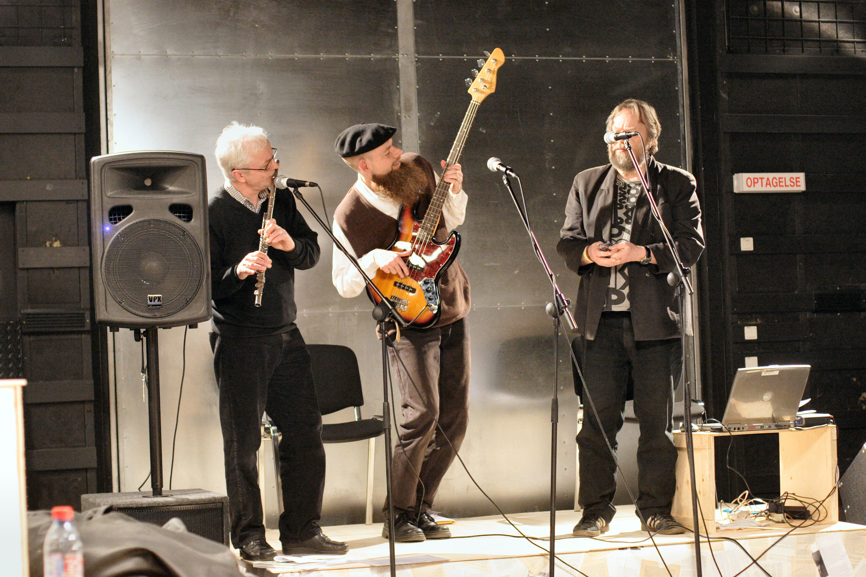 Trio "Ak, Du Lyver Albertine" optræder på "Vild med Ord" 2010 i Aarhus den 24. april